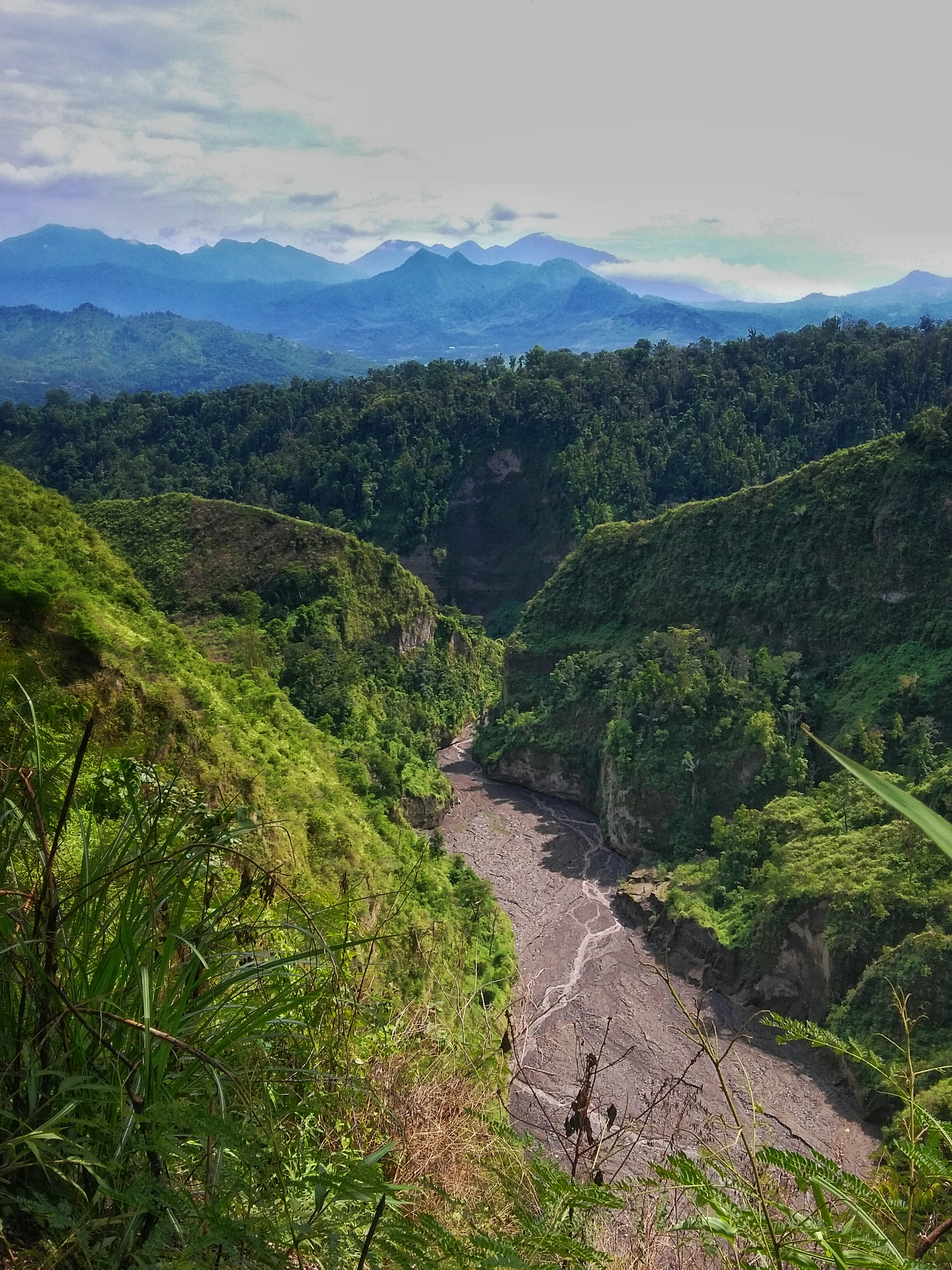 Jalan lahar